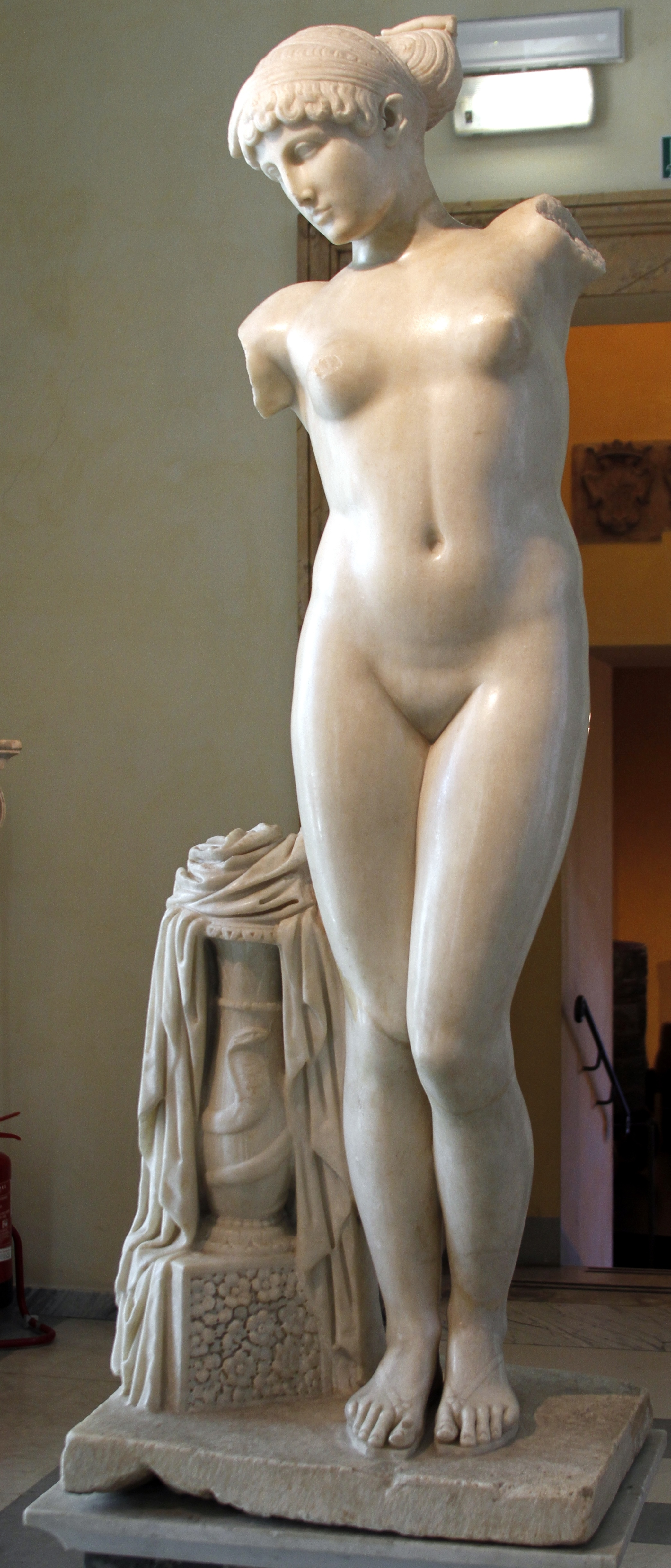 Musei Capitolini - Rome